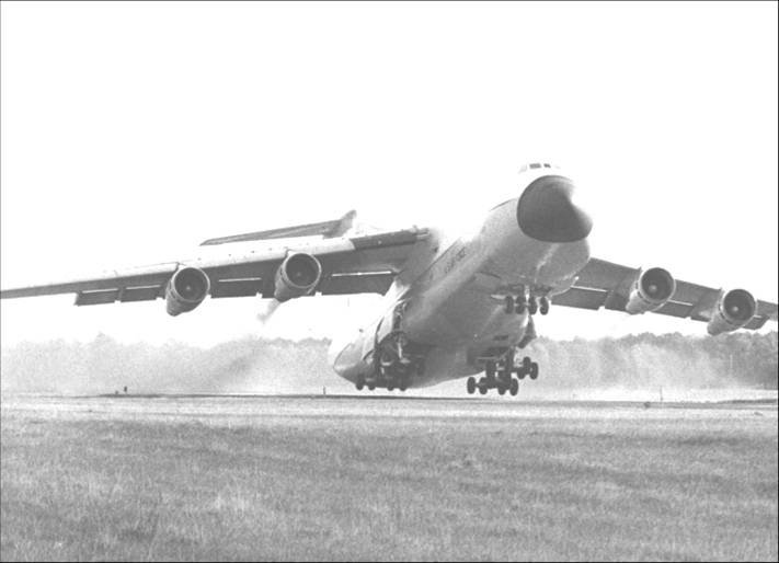 Eine Galaxy startet auf dem Heeresflugplatz Celle